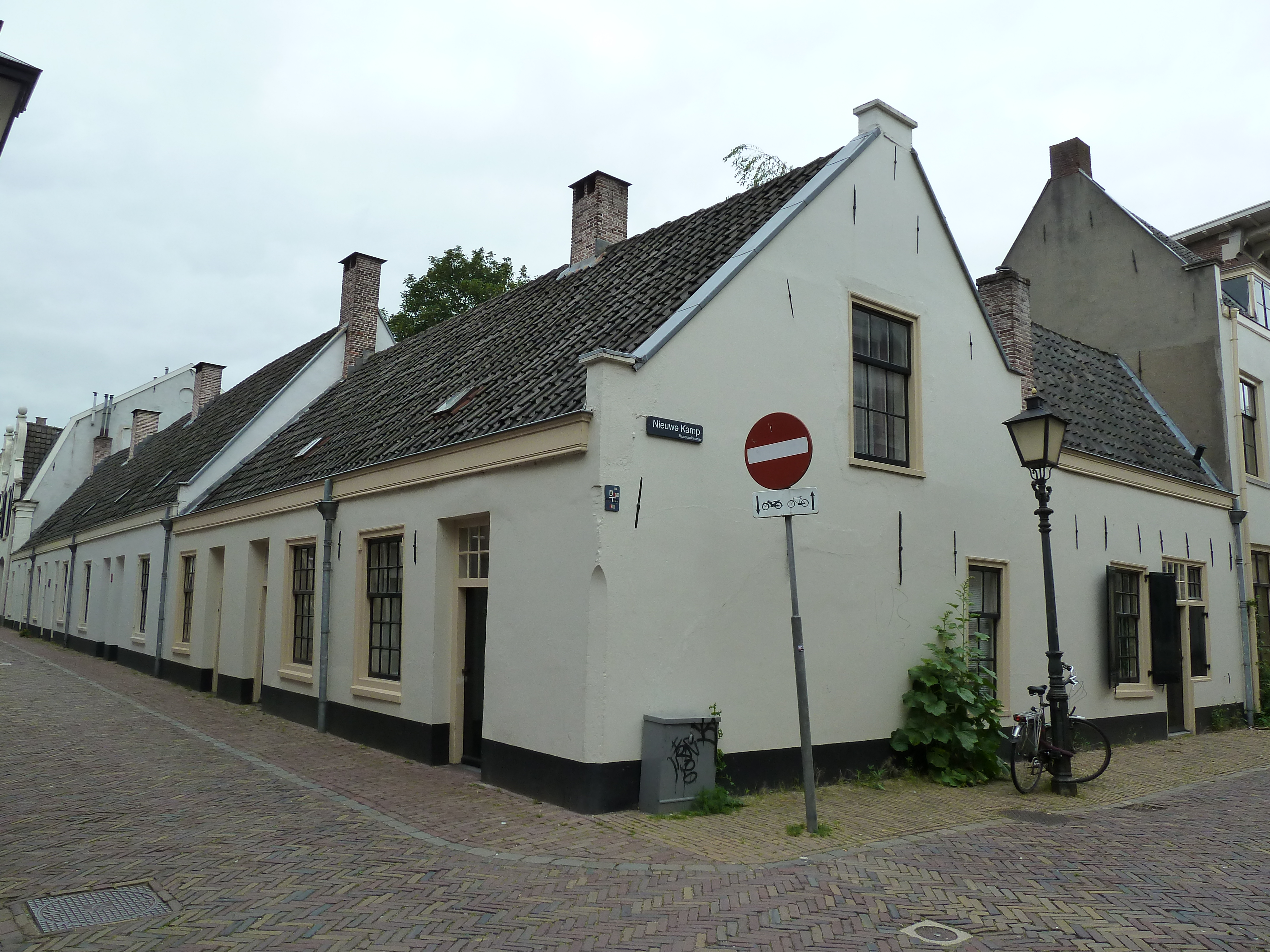 Kameren van Jan van Campen, Schalkwijkstraat, Nieuwe Kamp, Utrecht, NL.